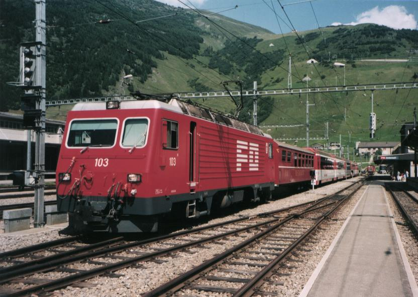 Eine HGe 4/4 II der Furka-Oberalp-Bahn mit einem Glacier-Express in Andermatt.